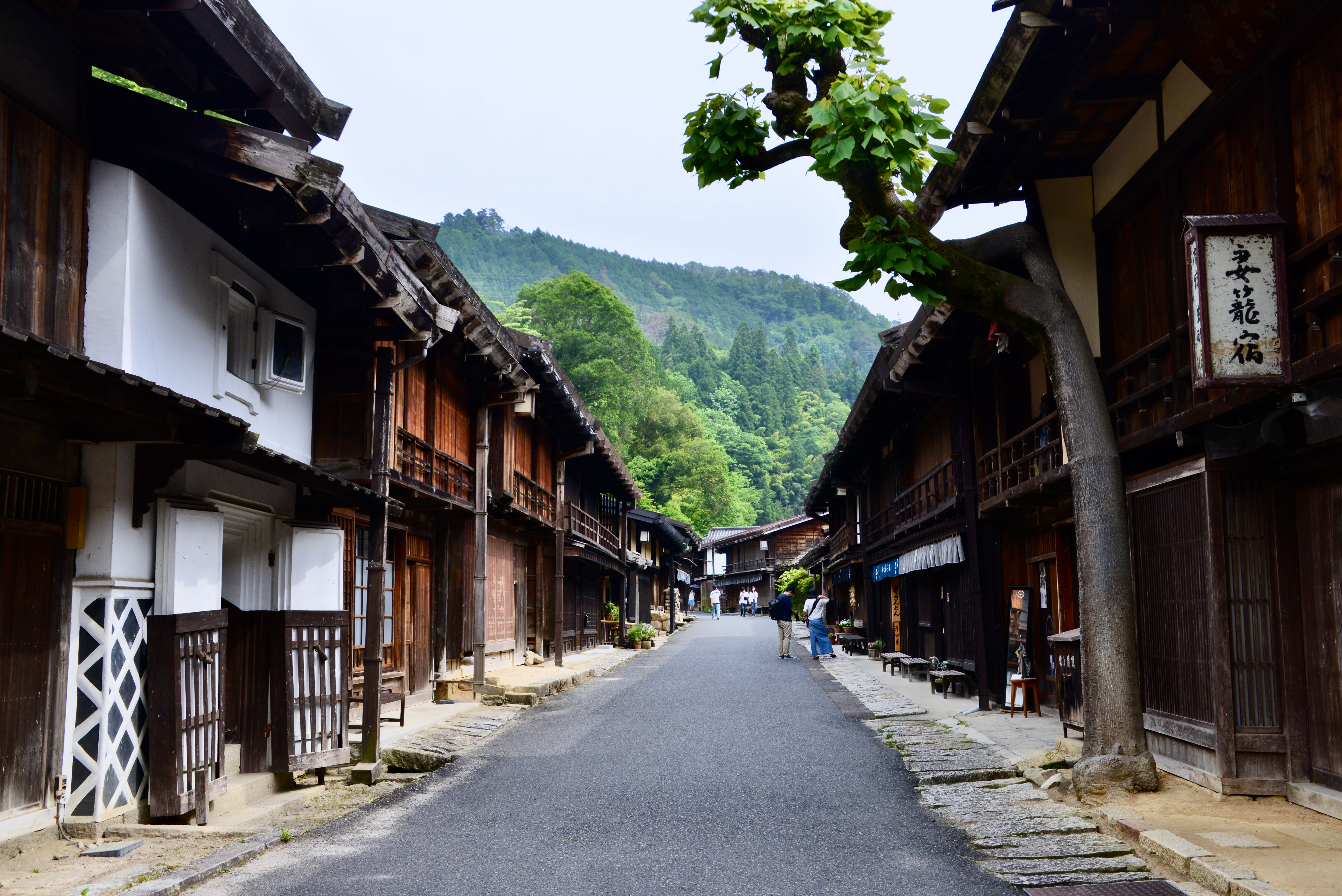 長野県南木曽町妻籠宿